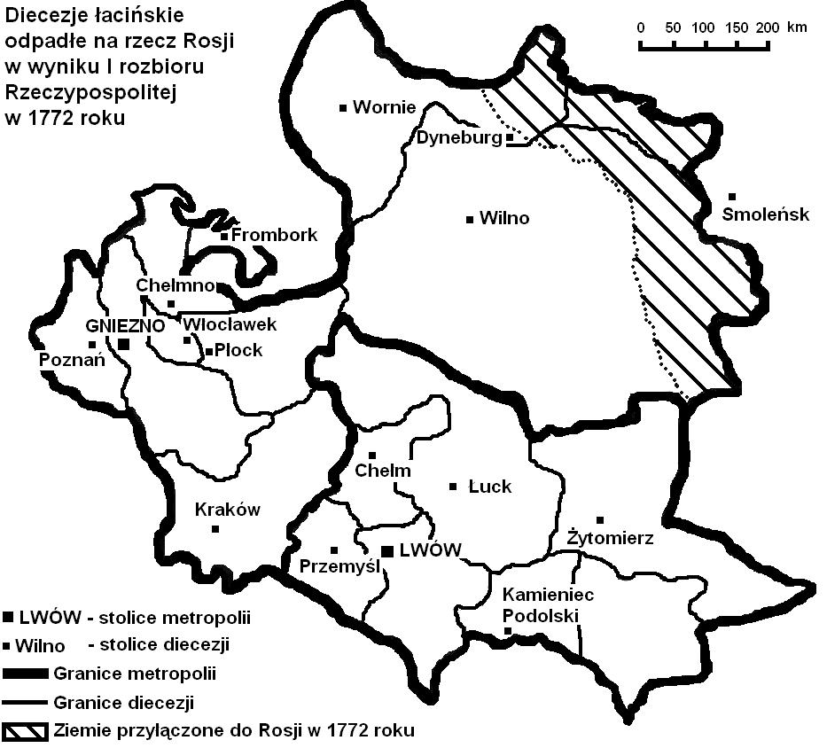 Diecezje łacińskie odpadłe na rzecz Rosji w następstwie I rozbioru Rzeczypospolitej w 1772 roku